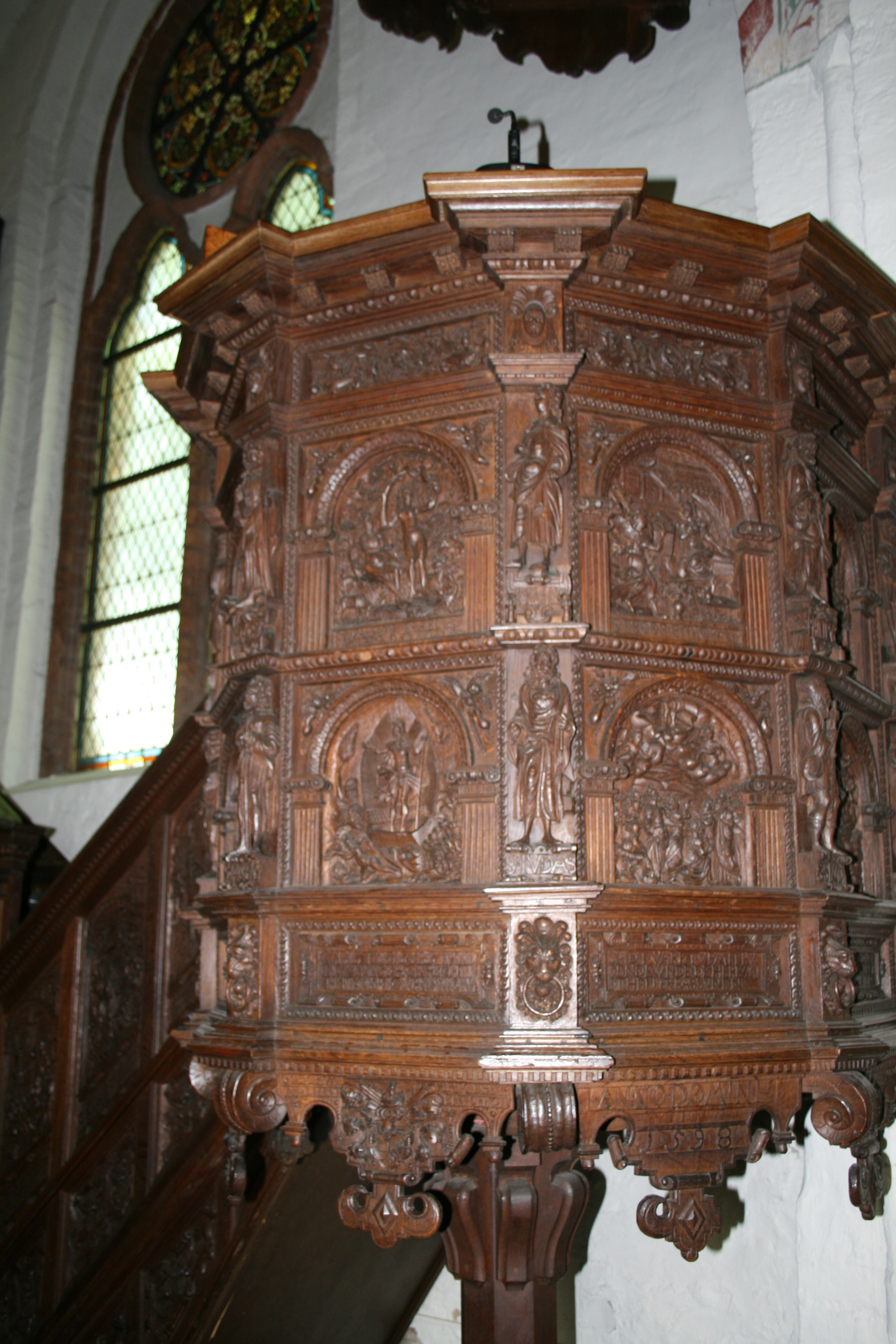 Kanzel der St.-Jürgen-Kirche in Gettorf (Schleswig-Holstein), 1598 von Hans Gudewerdt dem Älteren